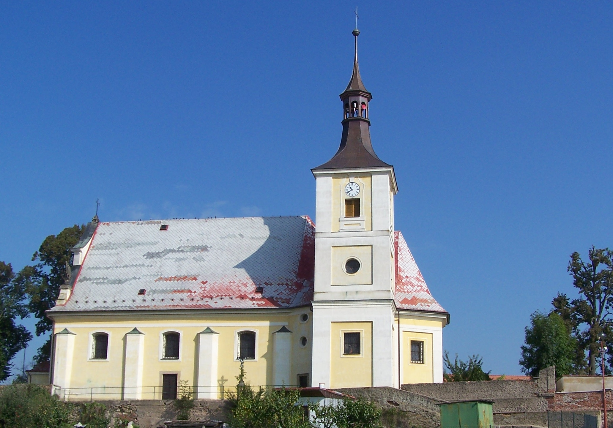 Kostel sv. Jana Křtitele (Holohlavy)